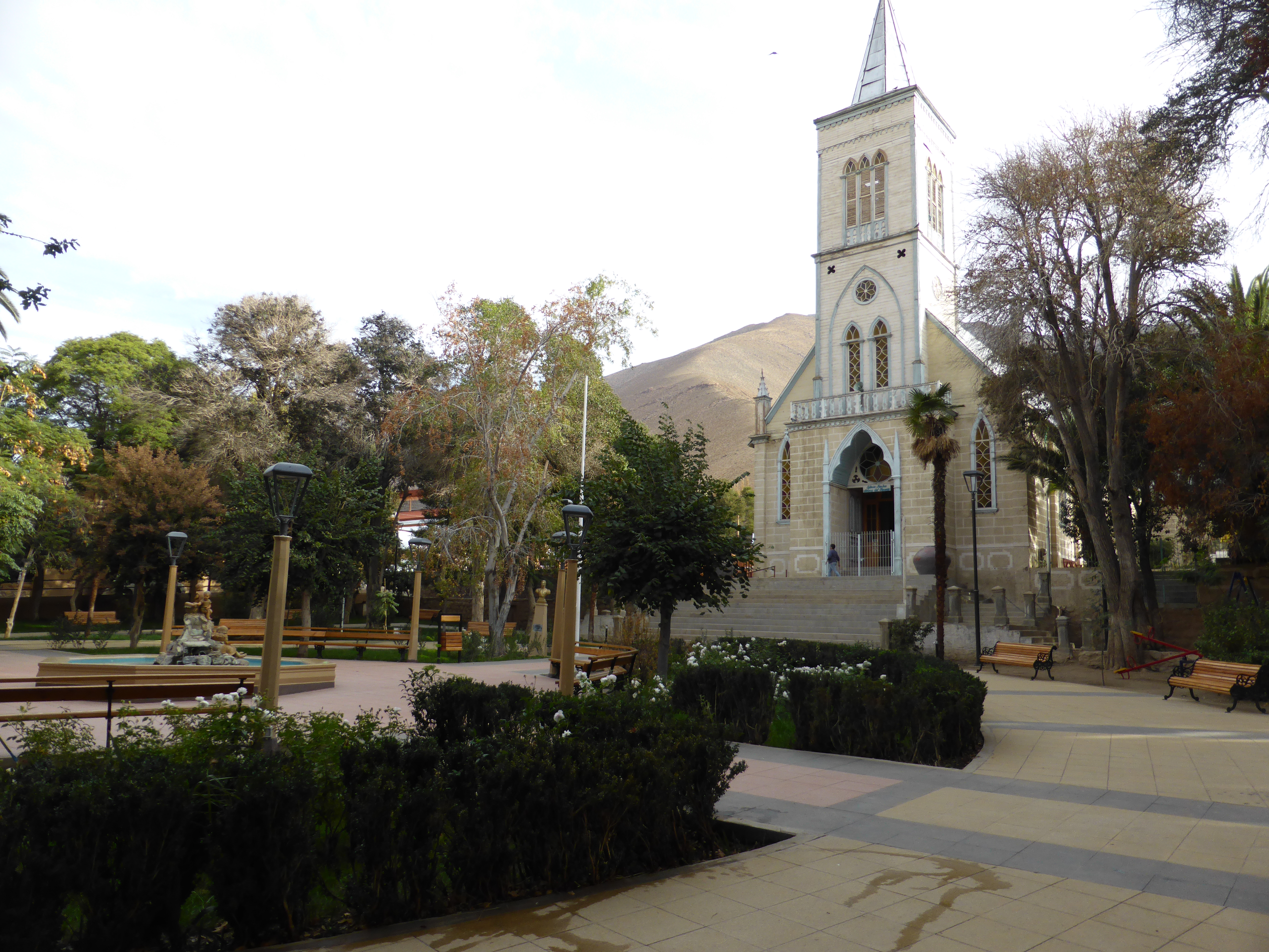 La iglesia del pueblo de Pisco Elqui está dedicada a Nuestra Señora del Rosario. Es de estilo neogótico. Construida principalmente en madera (torre y bóvedas), aunque con muros bajos de mampostería.